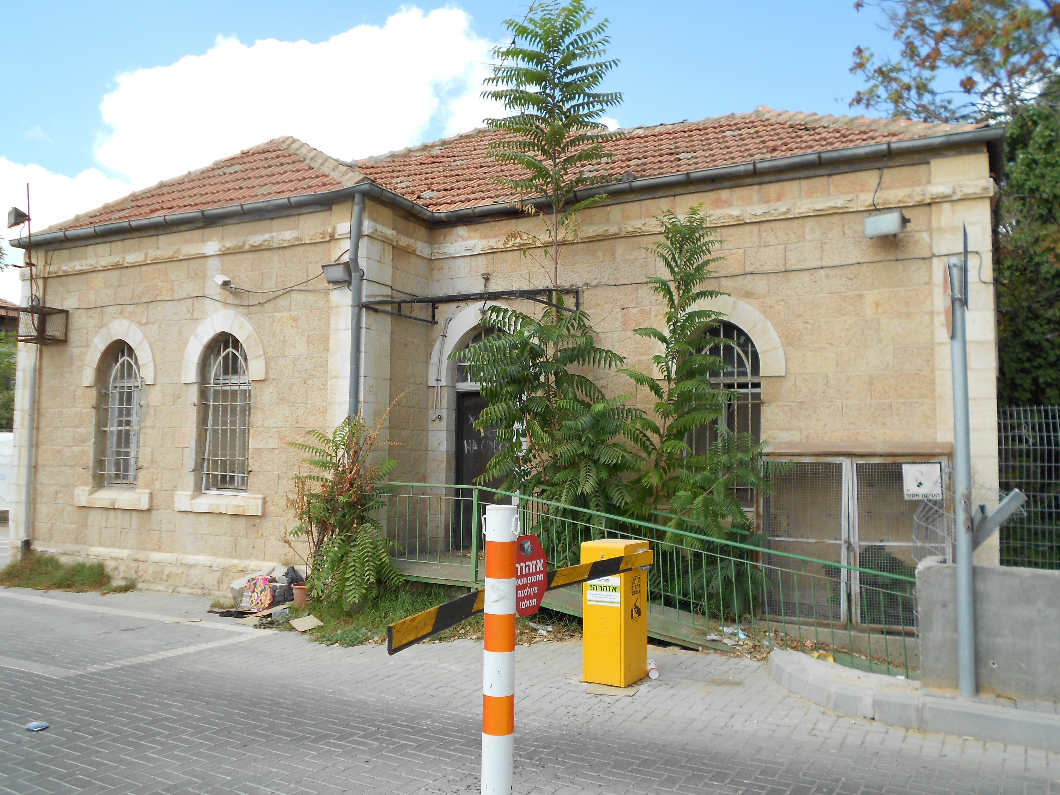 מעון ניב הוא מתחם של שלושה מבנים חד-קומתיים ברחוב עמק רפאים בירושלים, ששימש עד 2005 מעון לילדים חירשים ונערות חוסות. נבנה בסוף שנות ה-20 על מתחם של 3.6 דונם. כיום המתחם נטוש ומיועד להקמת מרכזי פנאי ומלון בוטיק.